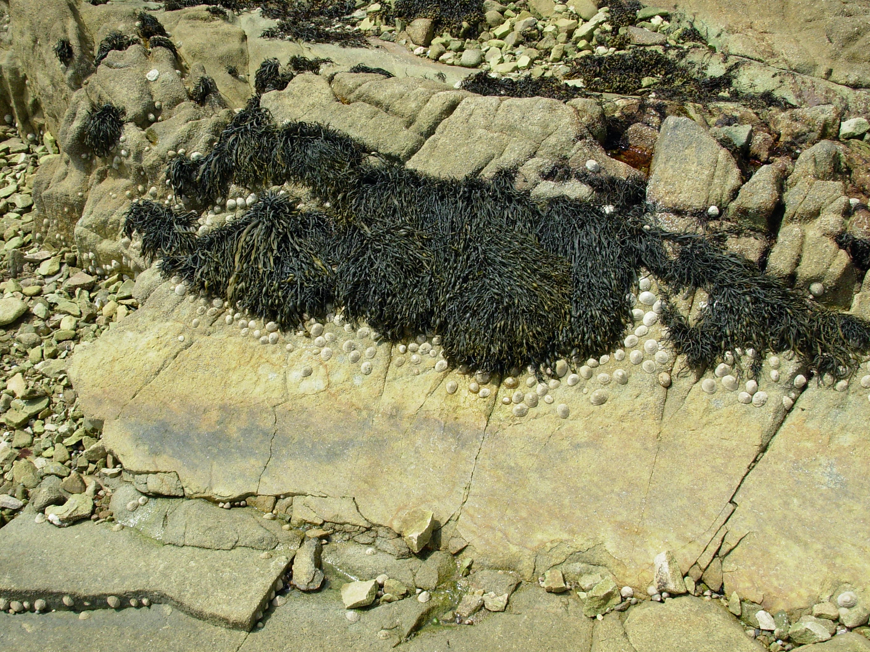 Front de berniques sur un champ résiduel d'ascophylles.